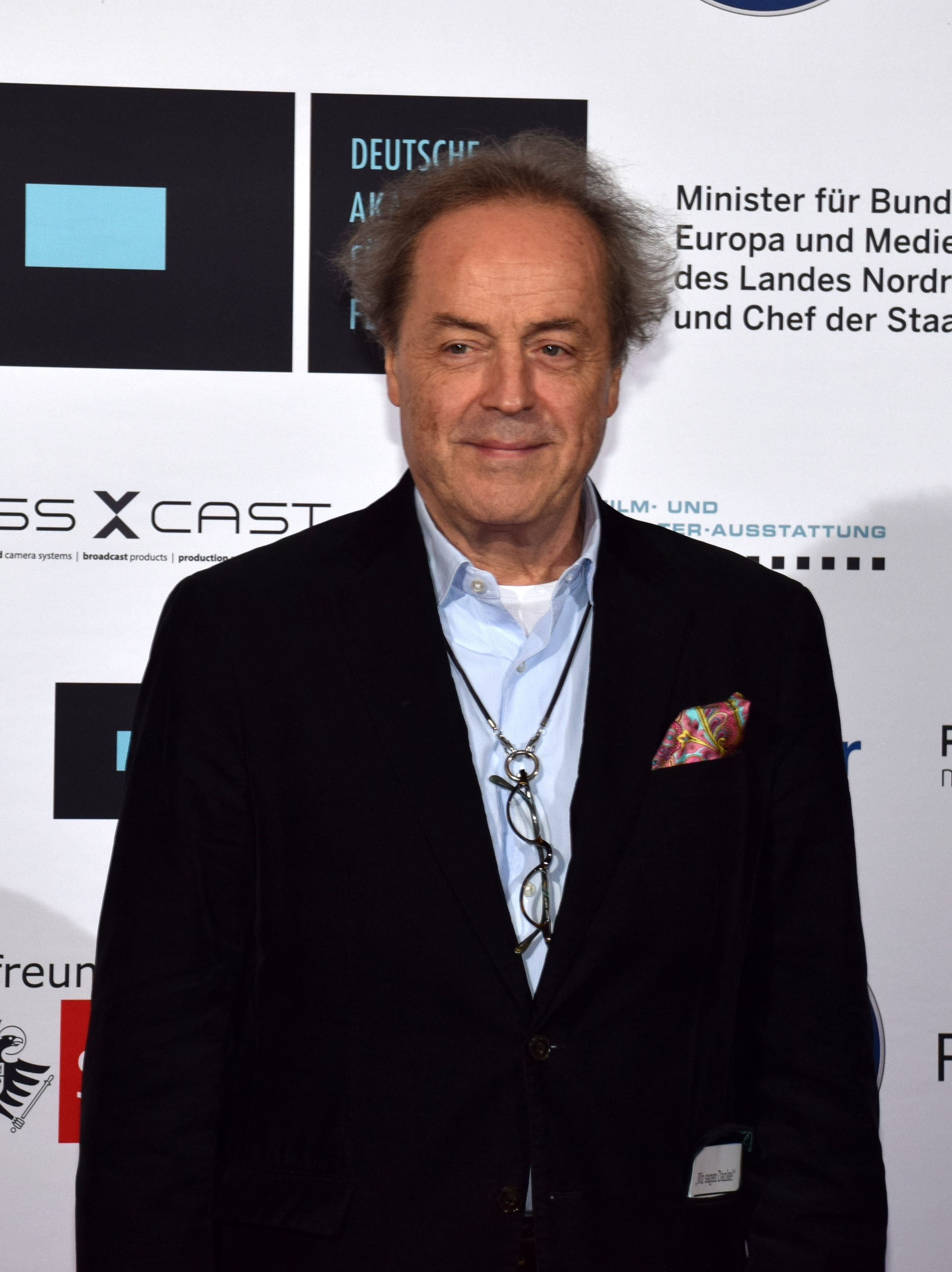 Stefan Lukschy (Regisseur) Deutsche Akademie für Fernsehen - Symposium und Preisverleihung 2015 in Köln